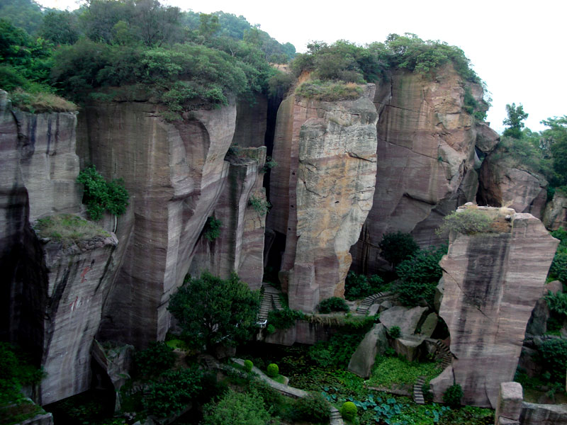 莲花山-人工丹霞